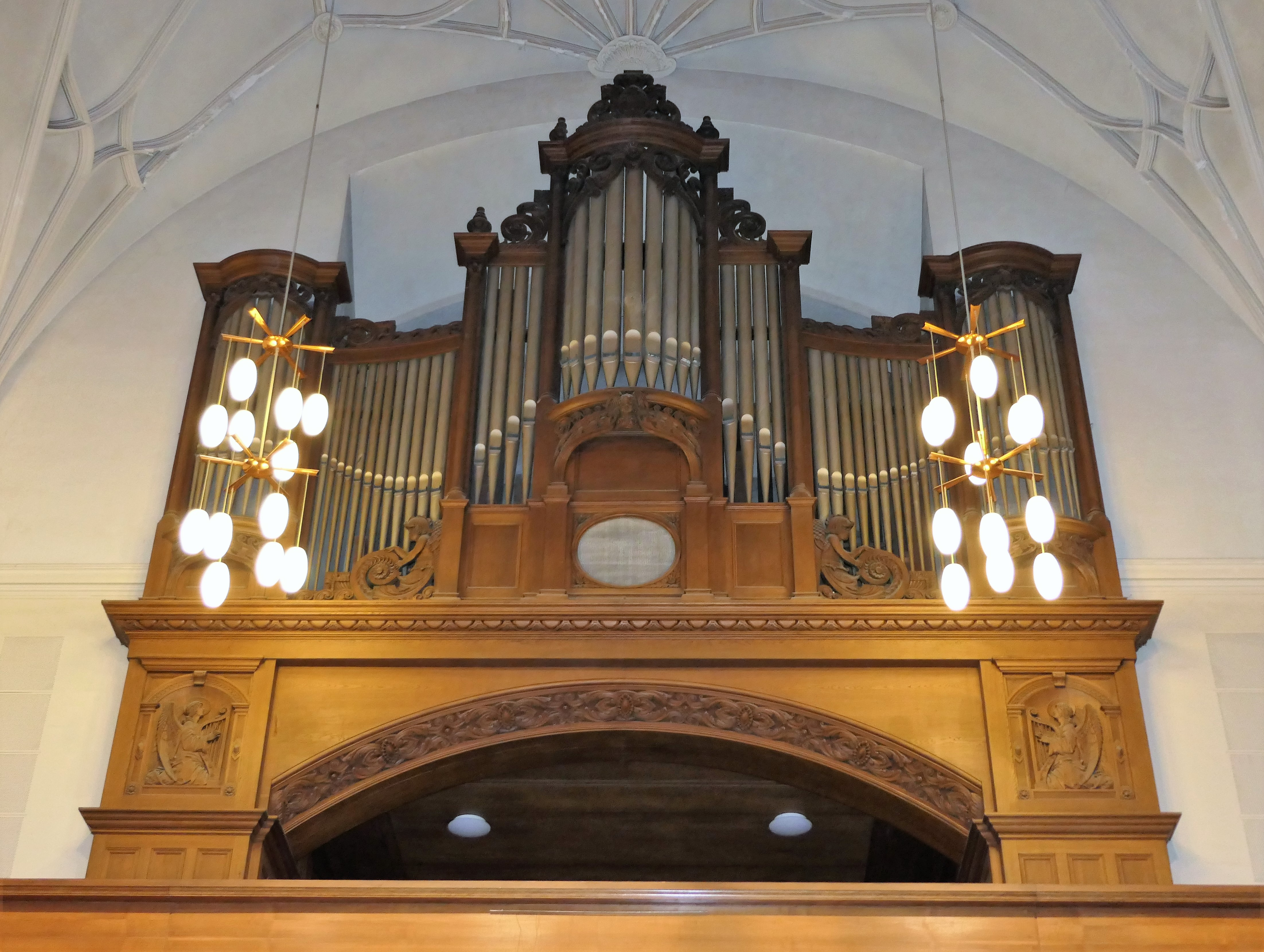 Orgel der Lukaskirch Dresden